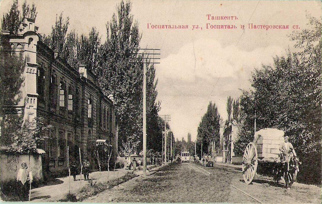 Ташкентский военный госпиталь, Госпитальная улица и Пастеровская прививочная станция, 1910-е